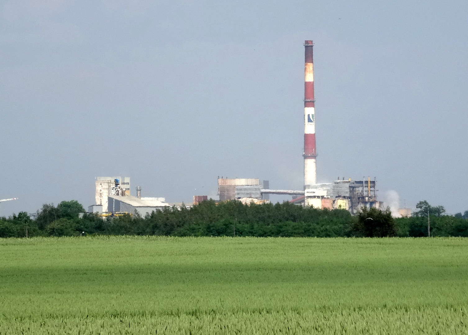 Inowrocławskie Zakłady Chemiczne "Soda-Mątwy" w Inowrocławiu, w składzie Ciech Soda Polska S.A.